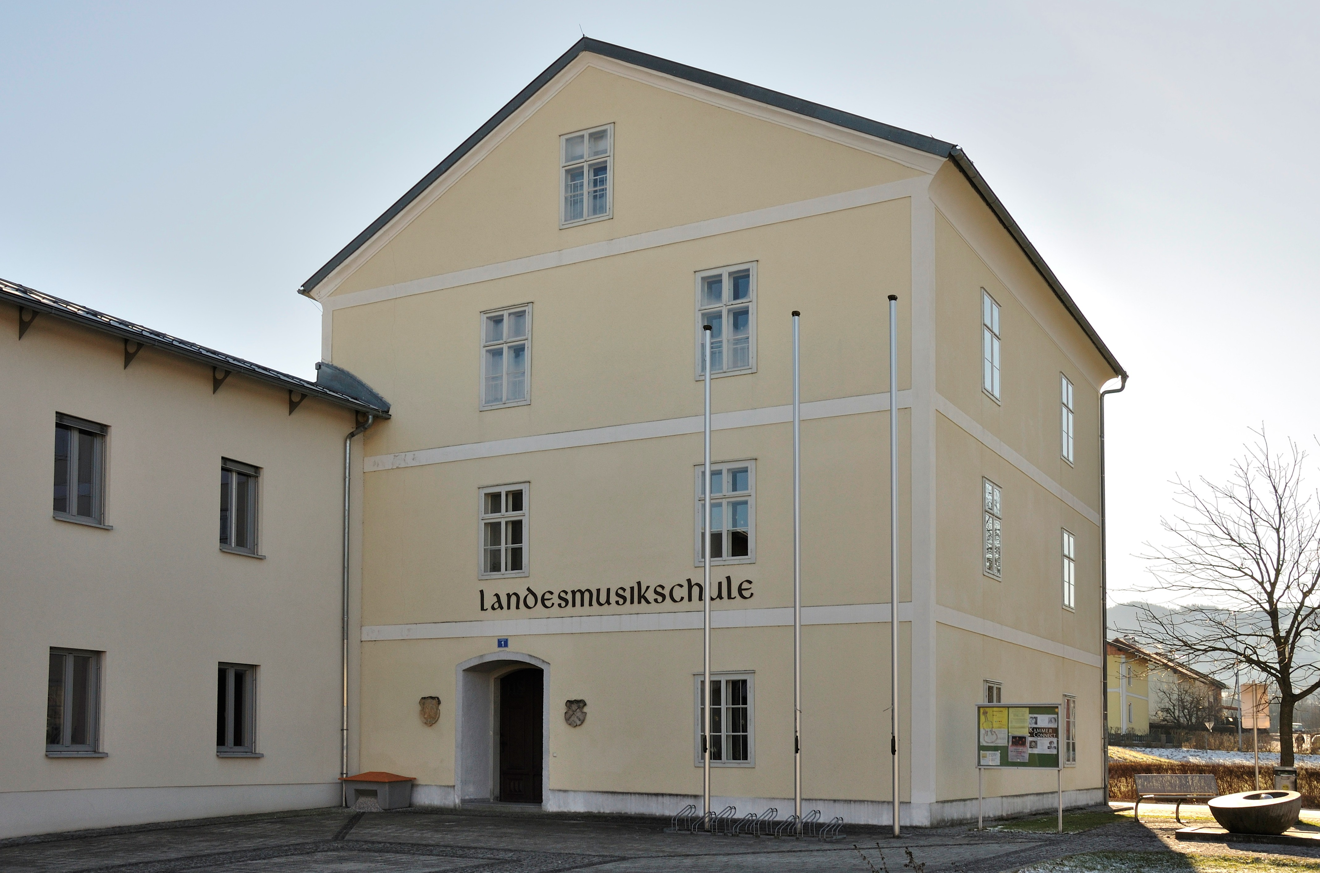 Sog. Schlössl, Musikschule